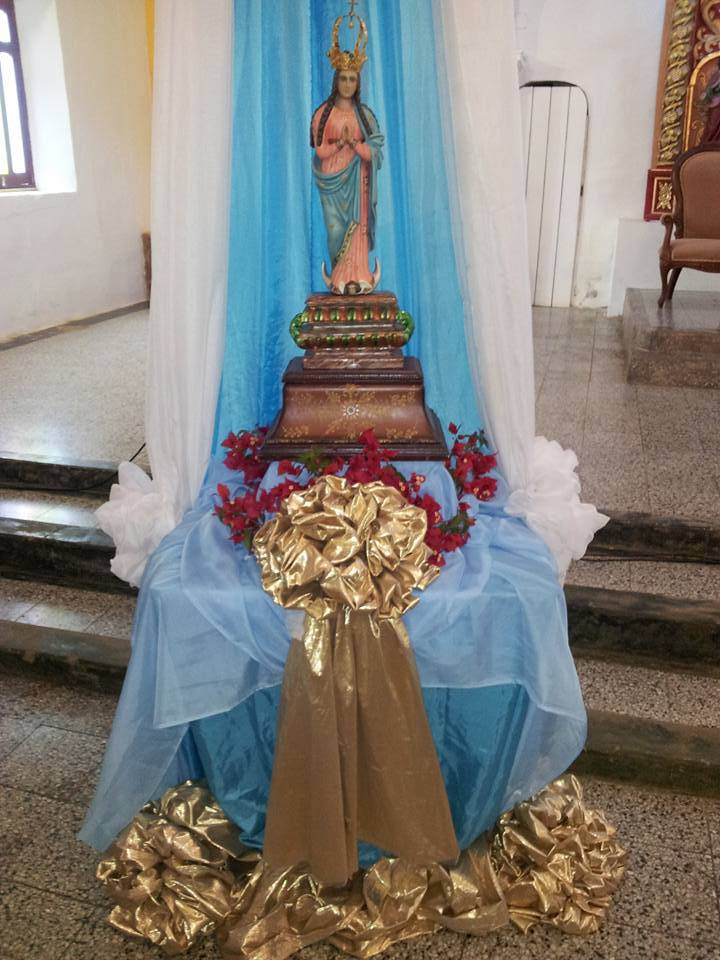 Virgen María Inmaculada Concepción, patrona de Capatárida